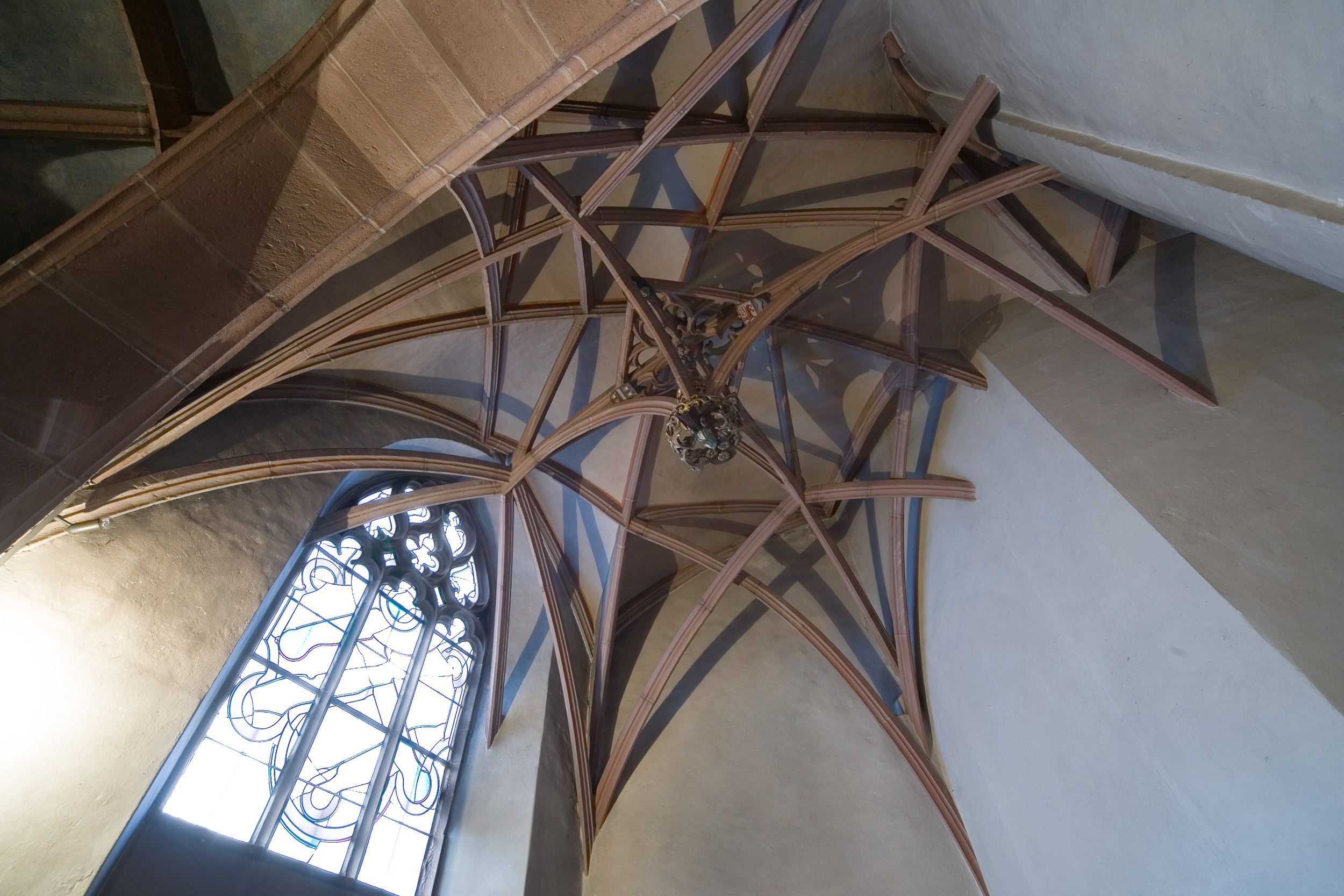 Hängendes Gewölbe von Hans Baltz von Mertenstein in der Salvatorkapelle des nördlichen Seitenschiffs der Leonhardskirche in Frankfurt am Main. Selber fotografiert im März 2008, Doppellizensierung GFDL & CC-BY-SA 2.5. Ein Detailbild des Gewölbescheitels findet sich hier